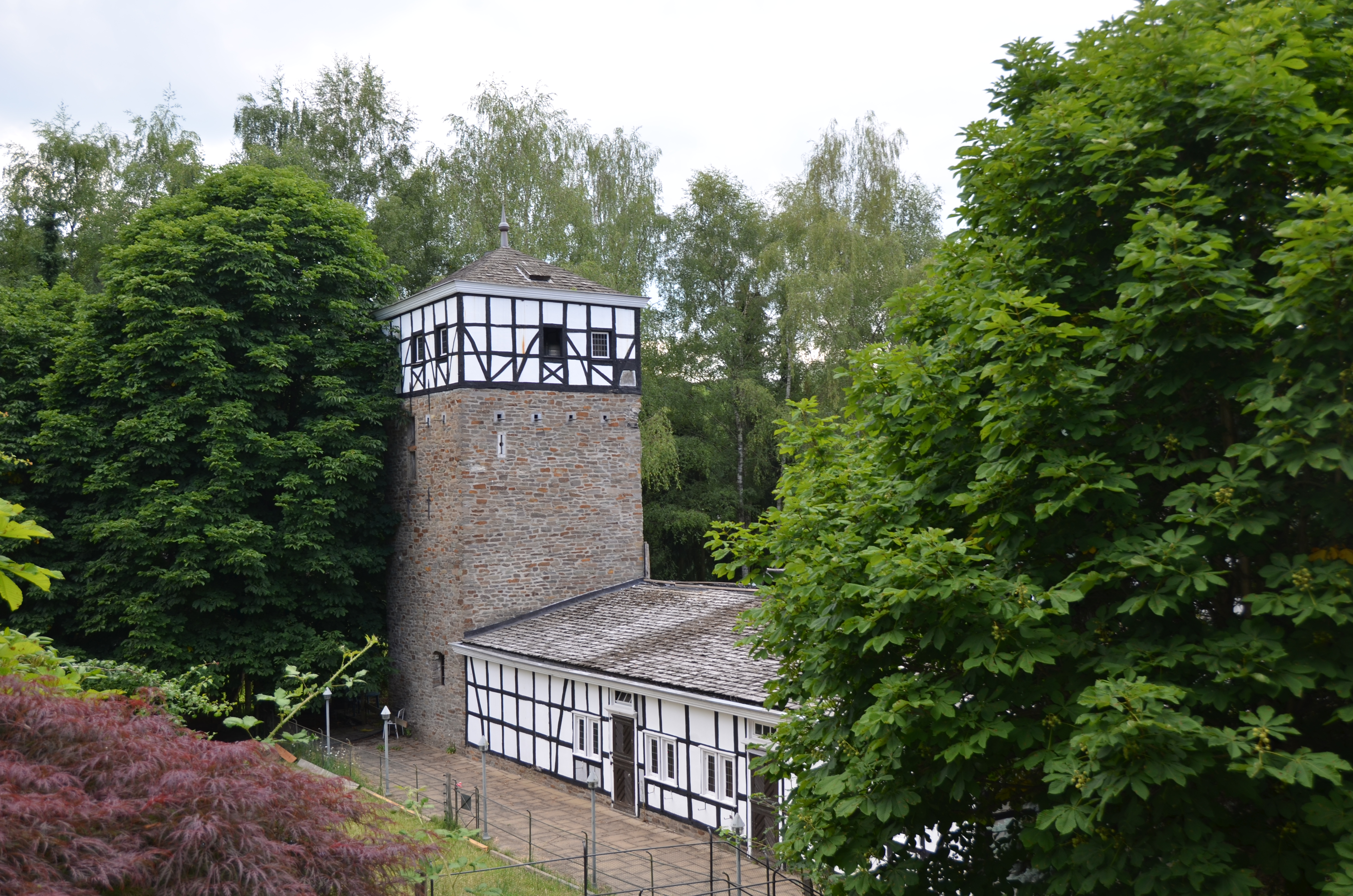 Gut Hungenbach, Kürten, Bergisches Land The making of this document was supported by the Community-Budget of Wikimedia Germany.